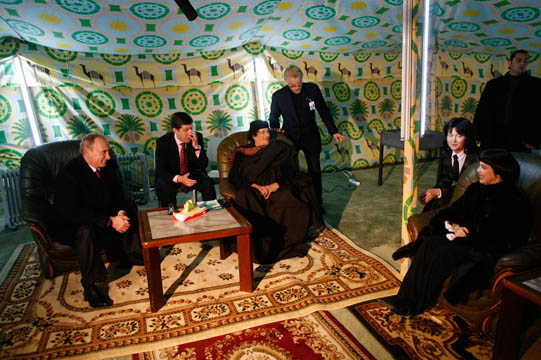 В.В.Путин посетил бедуинскую палатку Руководителя ливийской революции Муамара Каддафи